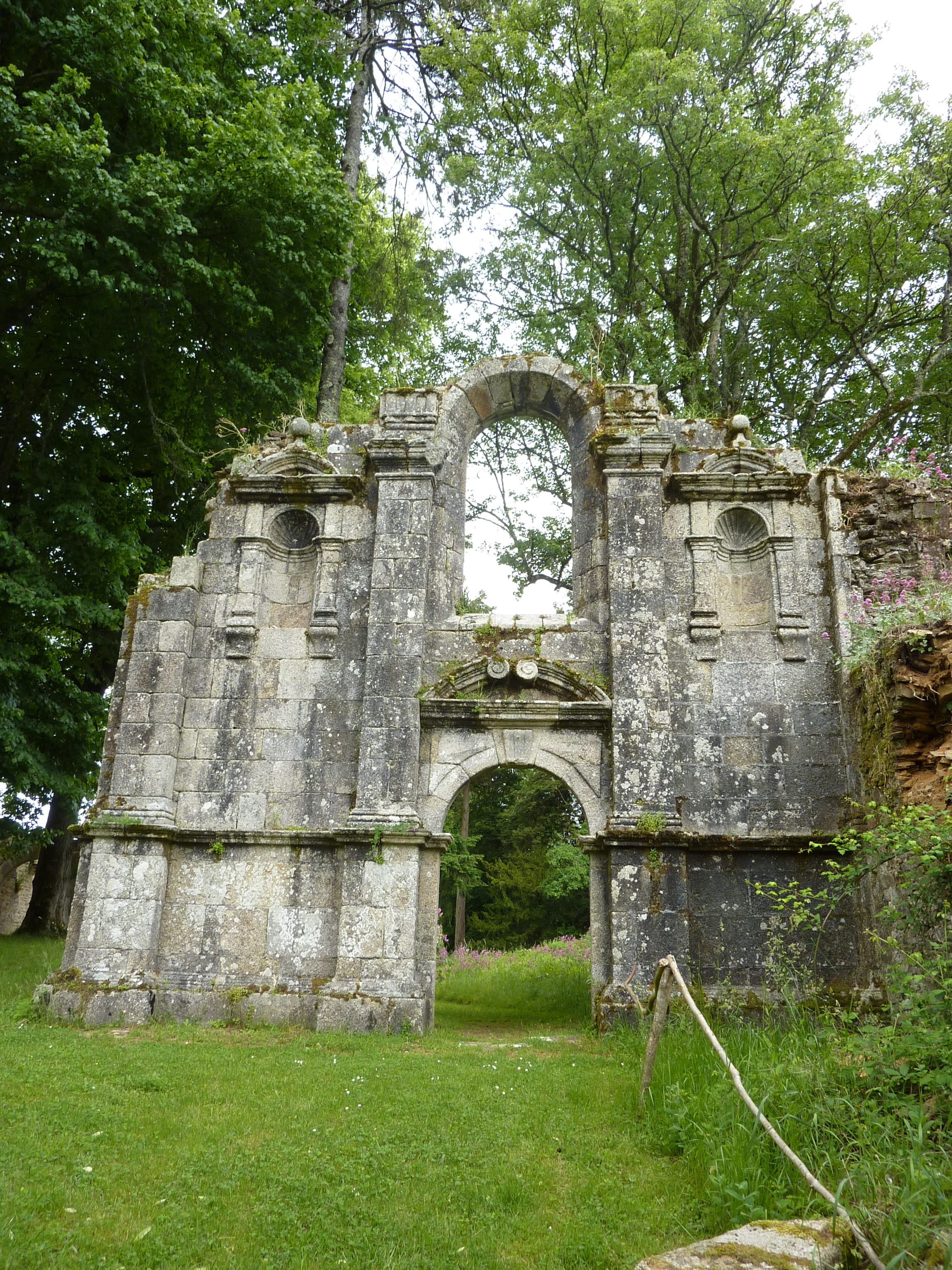 Abbaye Saint-Maurice de Carnoët Fronton de l'église abbatiale en ruine